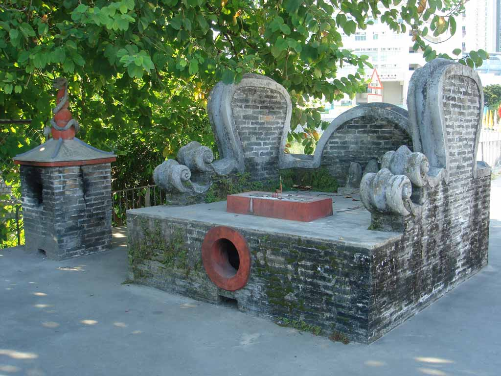 中文（香港）: 社壇。